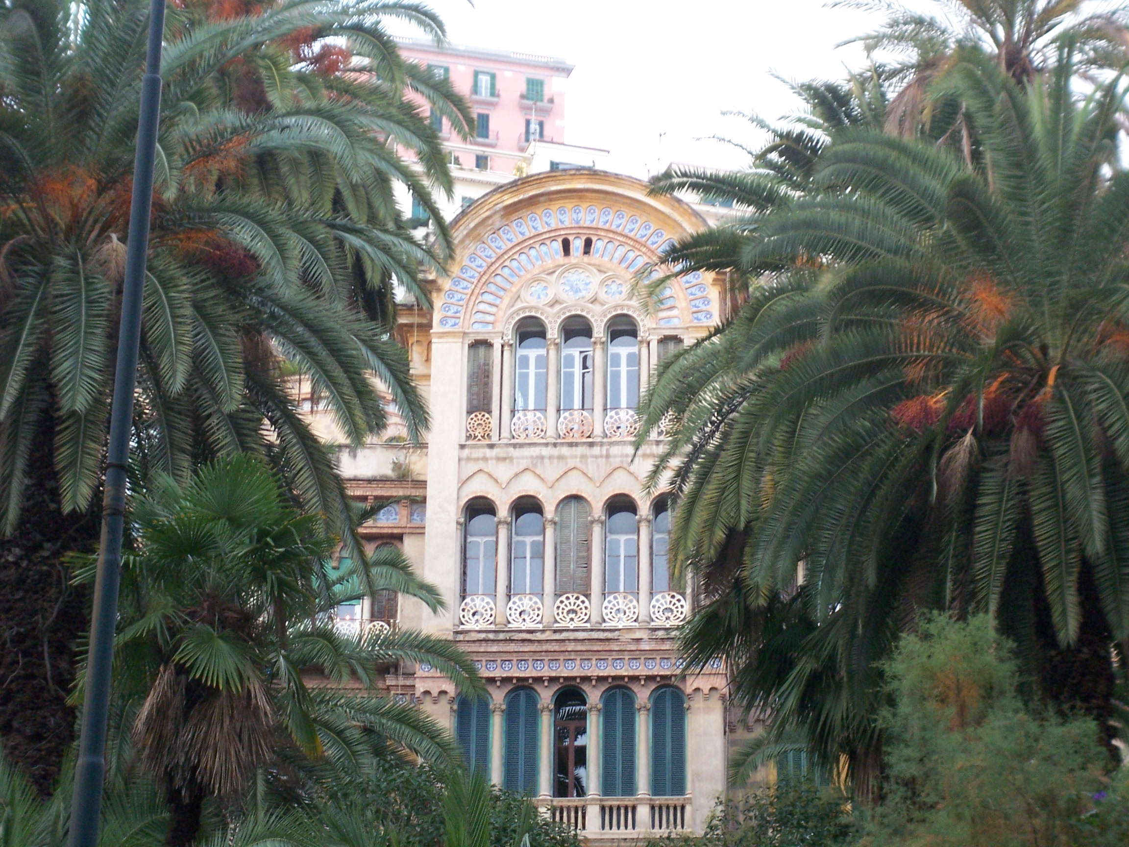 Palazzo del Grand Hotel Eden, oggi denominato Villa Maria - Particolare